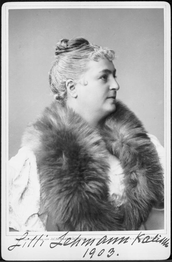 Lilli Lehmann. Fotografie von Julius Cornelius Schaarwächter, signiert 1903